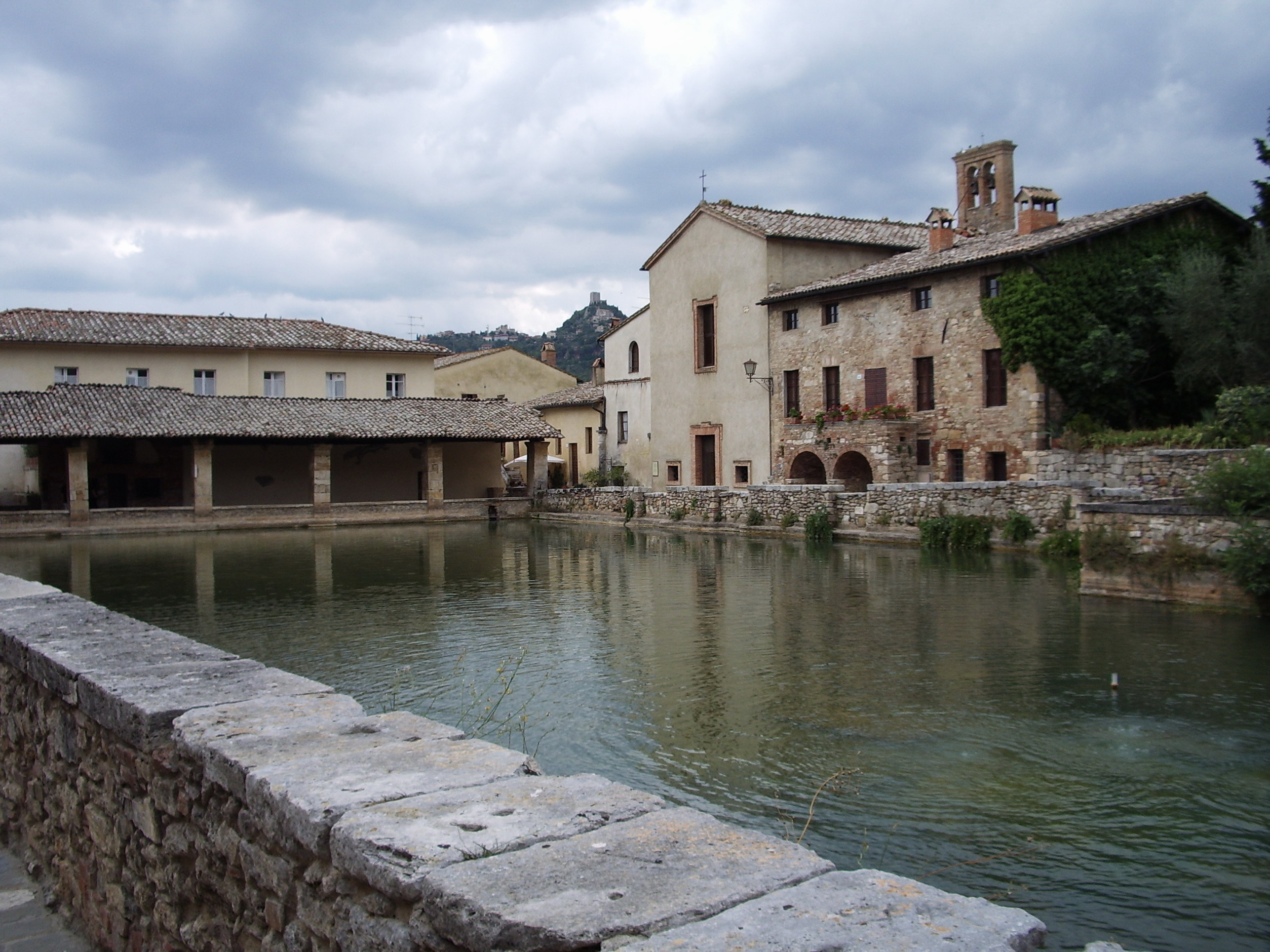 descrizione: vasca termale nella piazza di Bagno Vignoni (SI) lavoro personale di Vinattieri Matteo (26/01/2007) che lascia in pubblico dominio